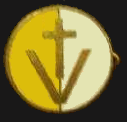 Distintivo utilizado por algunos revolucionarios de 1955. Se observa el signo de Cristo Vence sobre los colores del Vaticano.